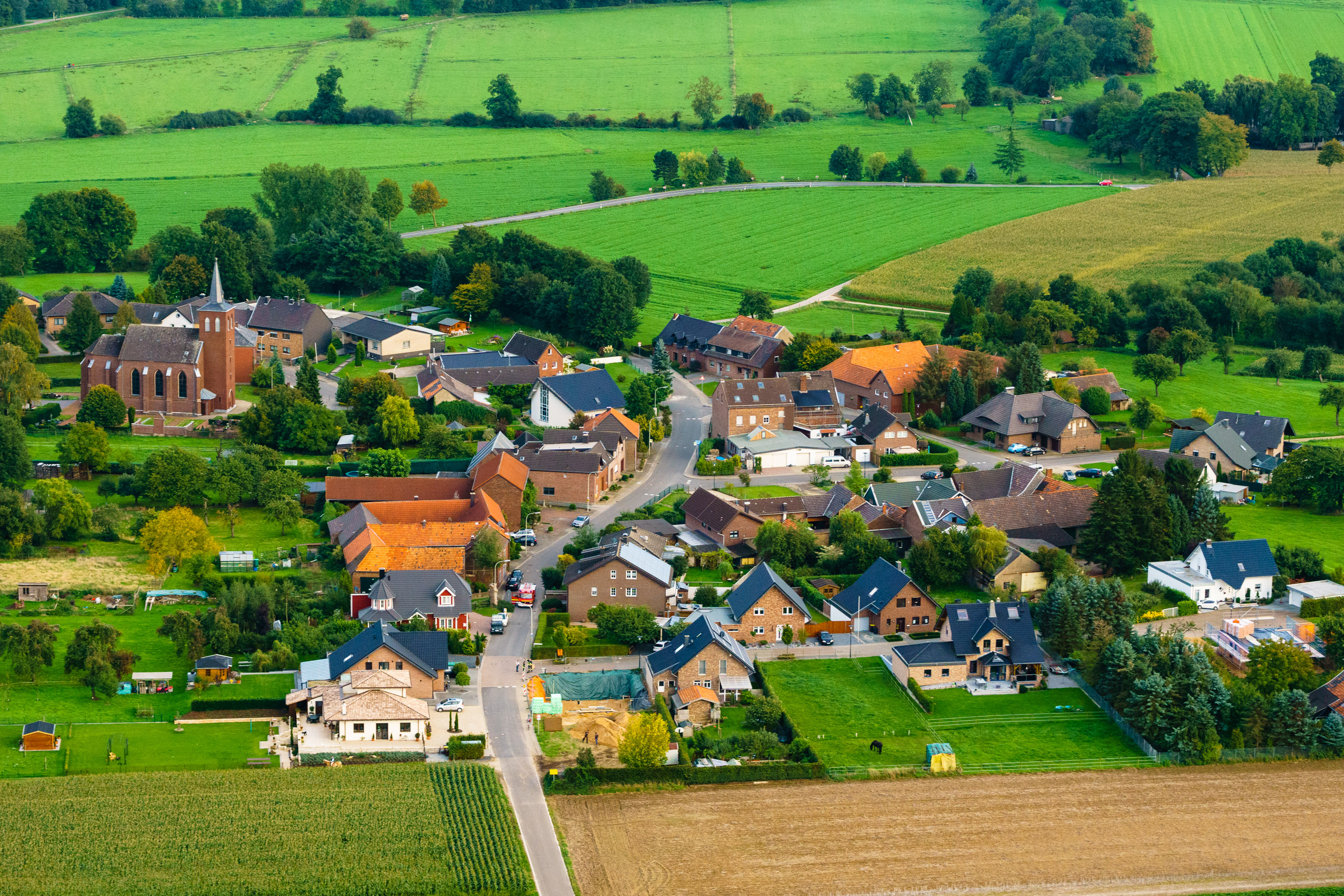 Geilenkirchen Kraudorf aus nordwestl. Richtung, Luftaufnahme